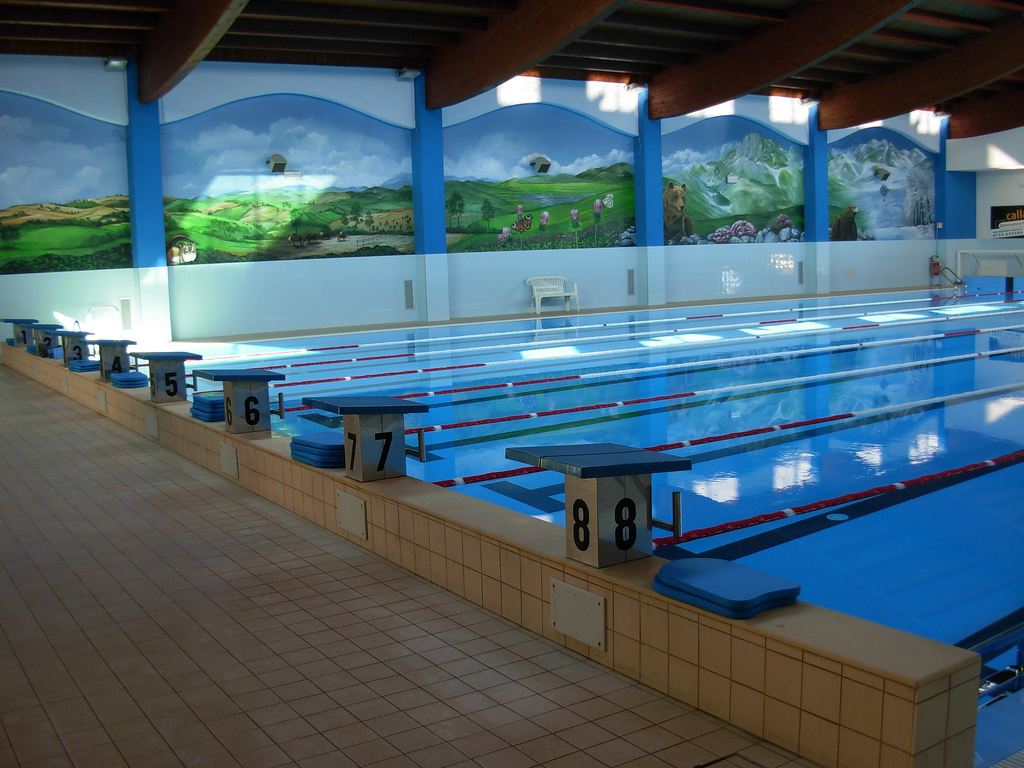 Veduta di una piscina al coperto, con in primo piano i blocchi di partenza.